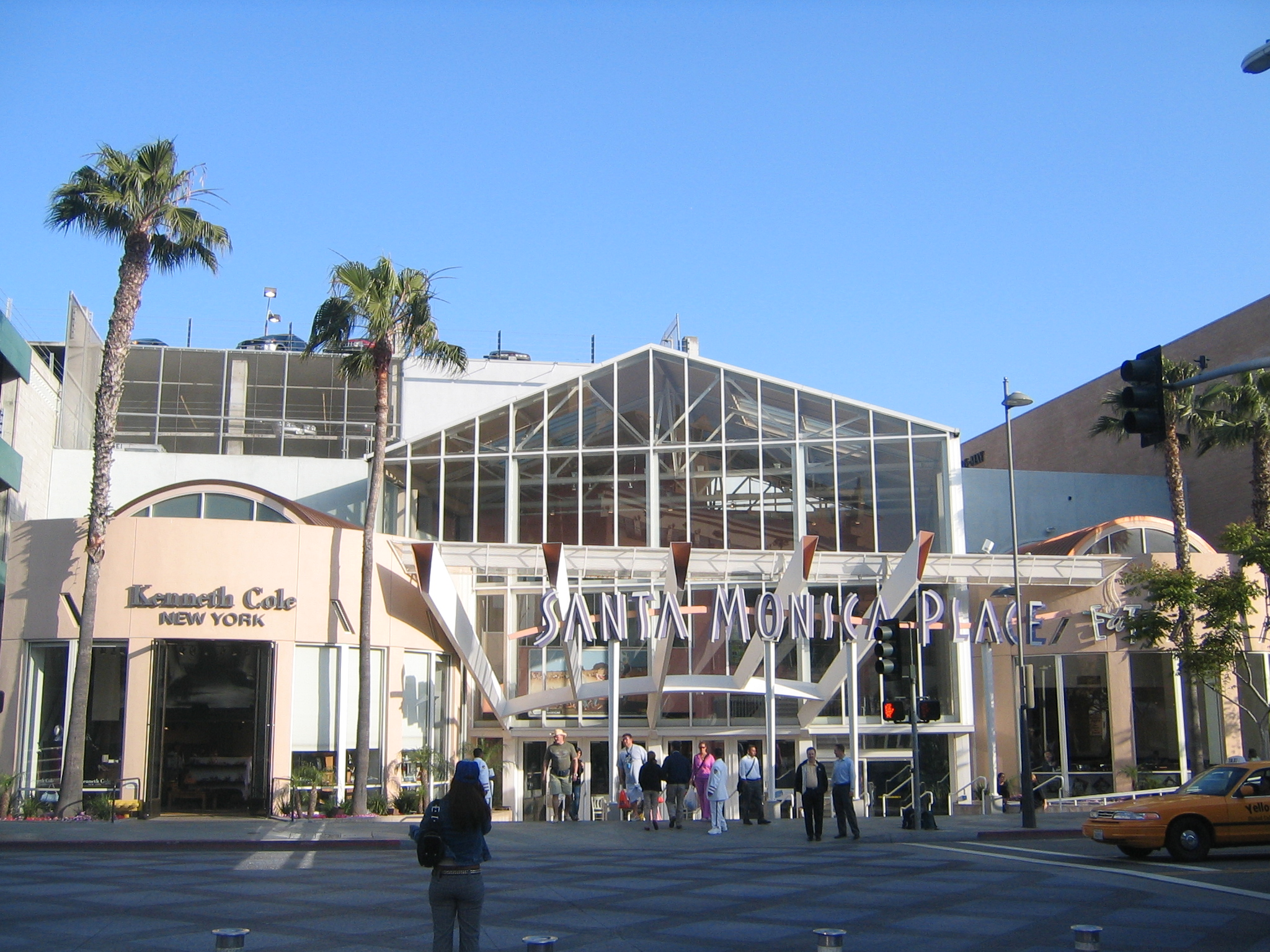 Santa Monica Place, a shopping mall in Santa Monica, California.